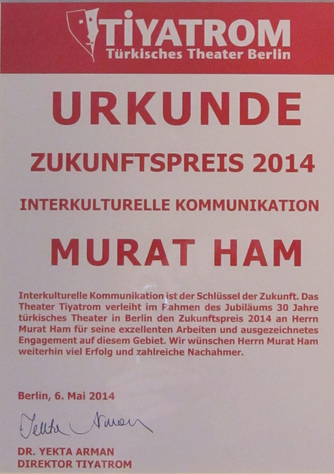 Urkunde des Zukunftspreises 2014.